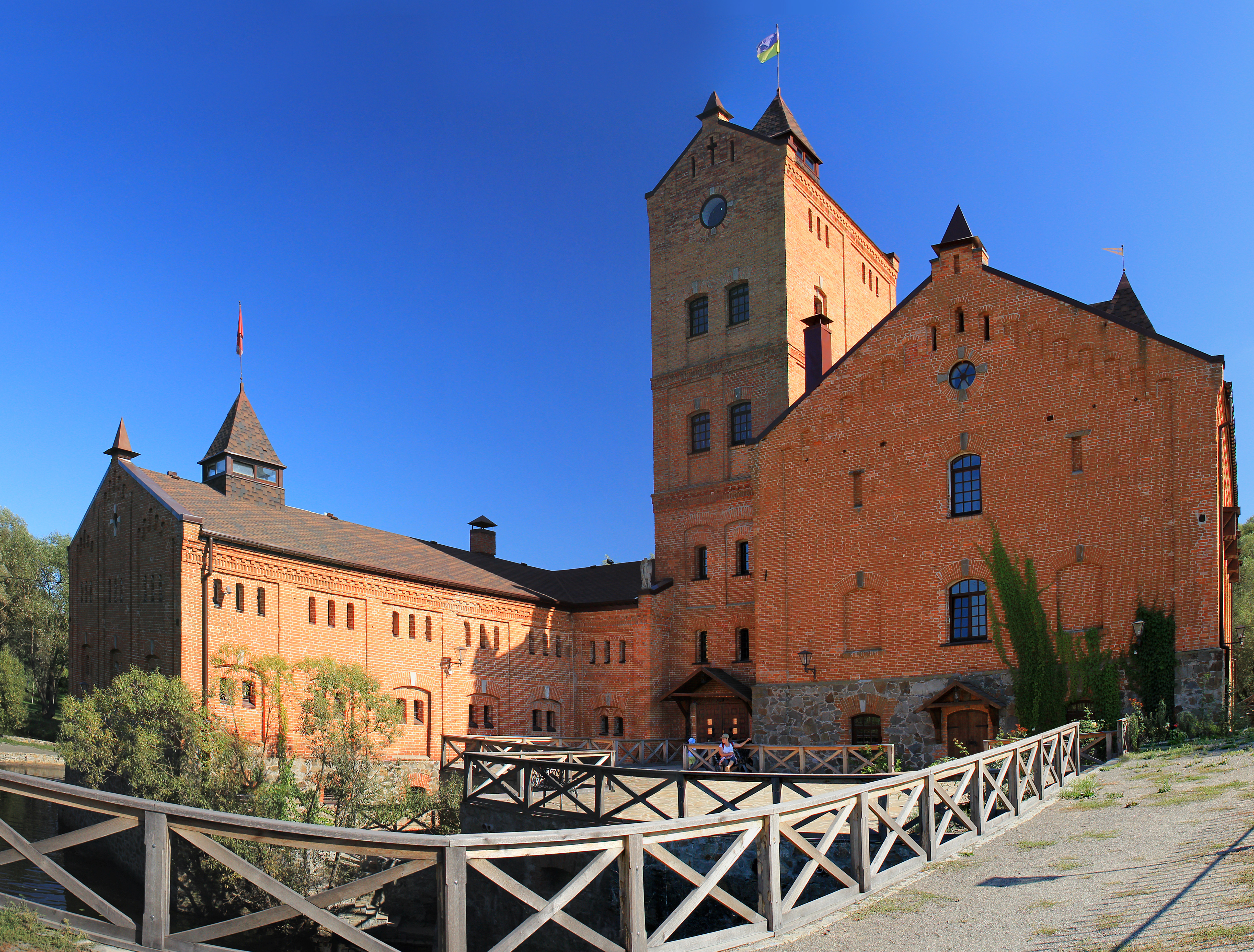 Папірня в Радомишлі